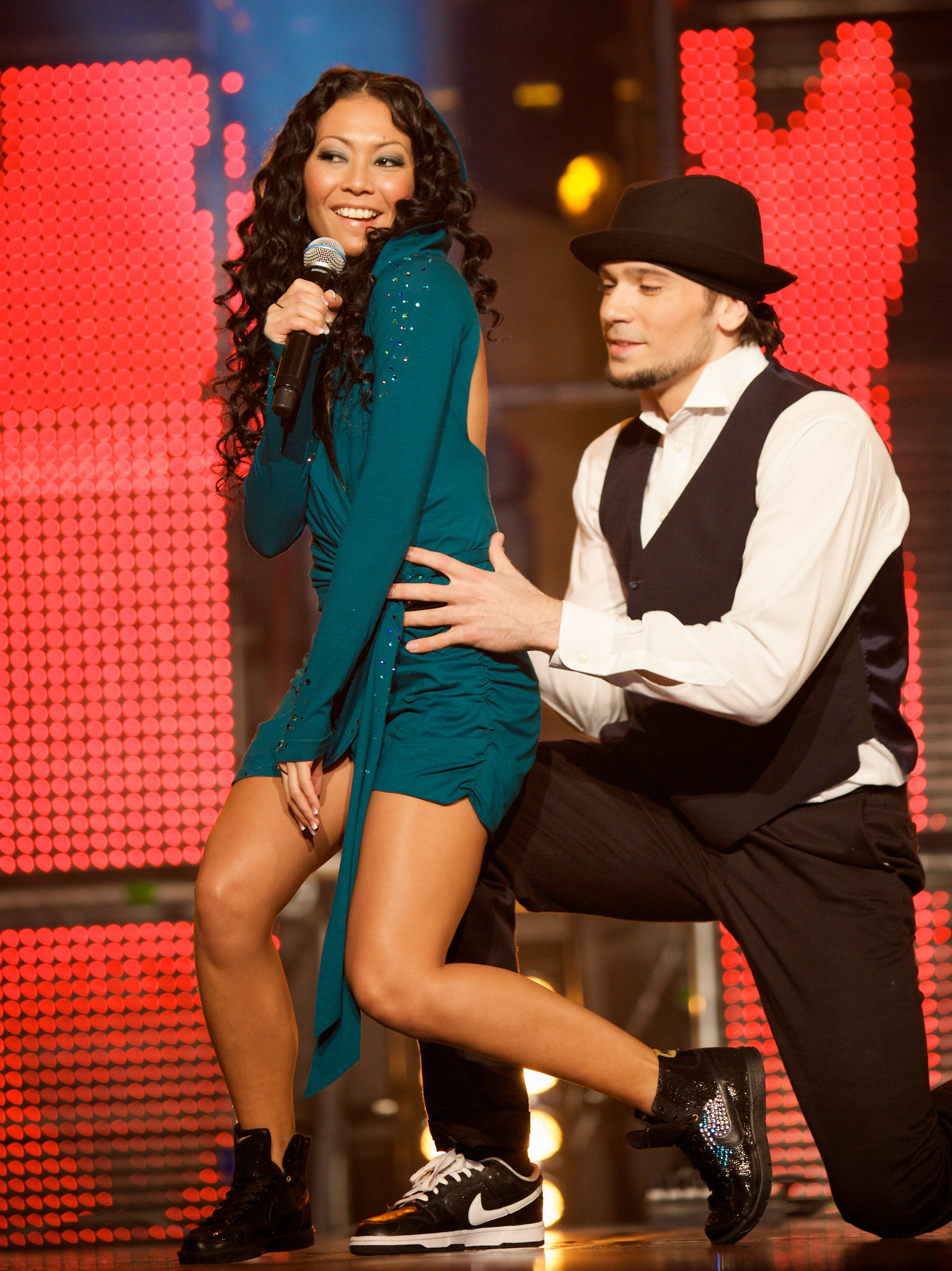 Belinda Braza